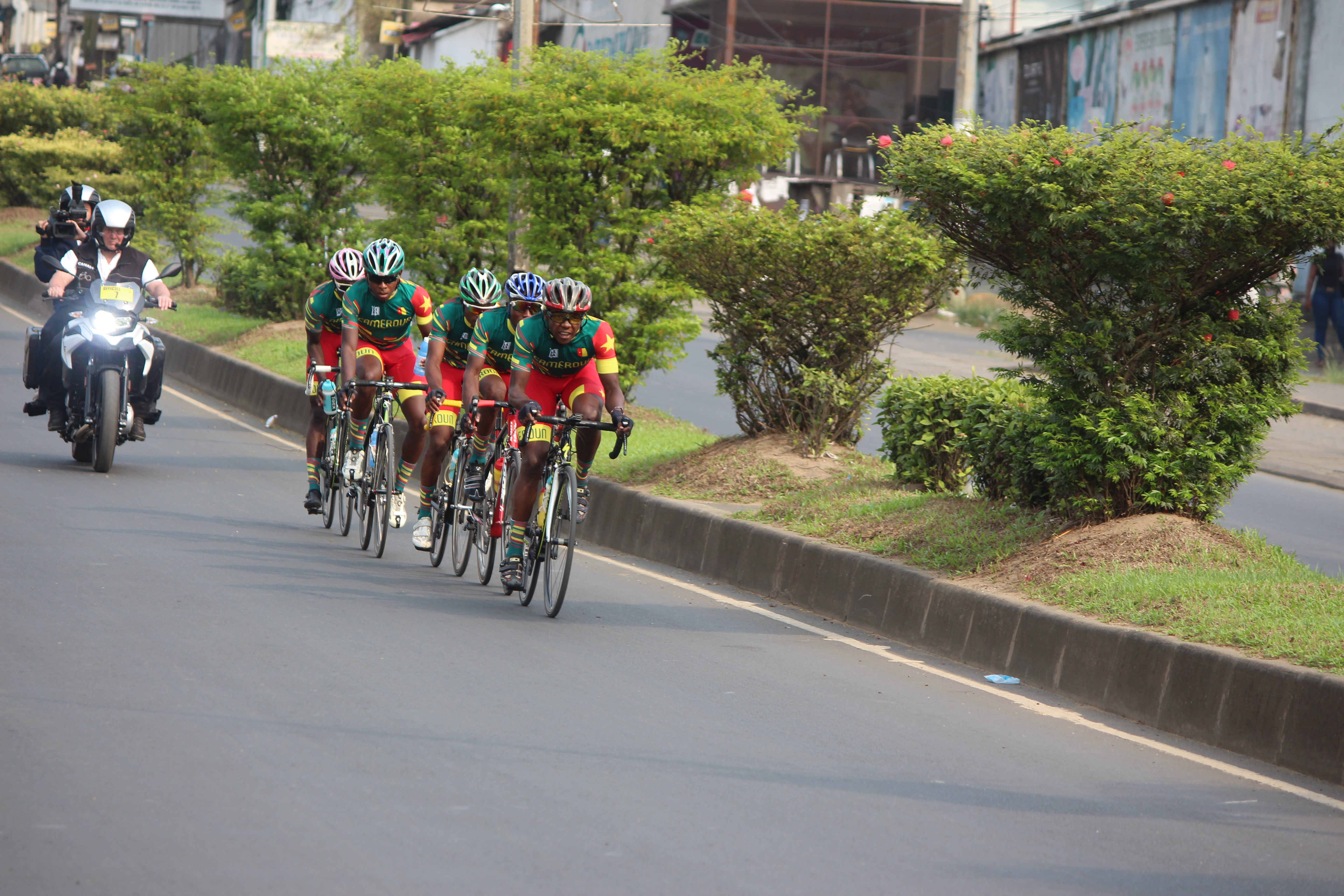 Pendant la coupe des nations de cyclisme des -23 ans à Douala au Cameroun This is an image with the theme "Africa on the Move or Transport" from: Cameroon